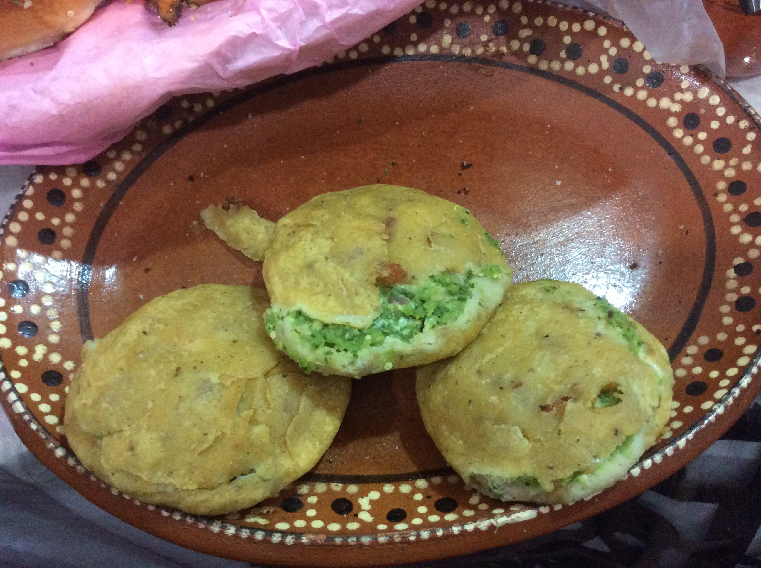 Gorditas en el día de muertos en Coyoacán, México D.F.